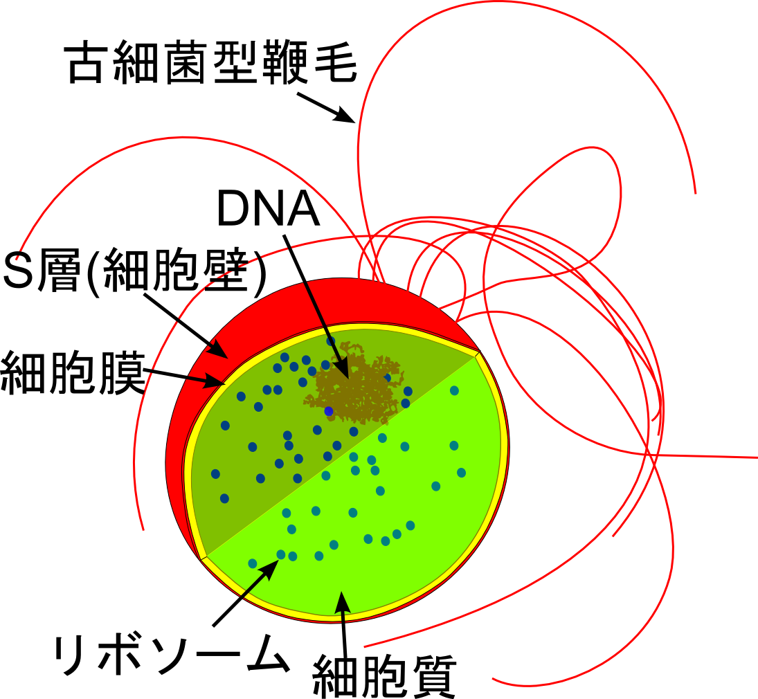 モデルはFile:Thermococcus gammatolerans.jpg